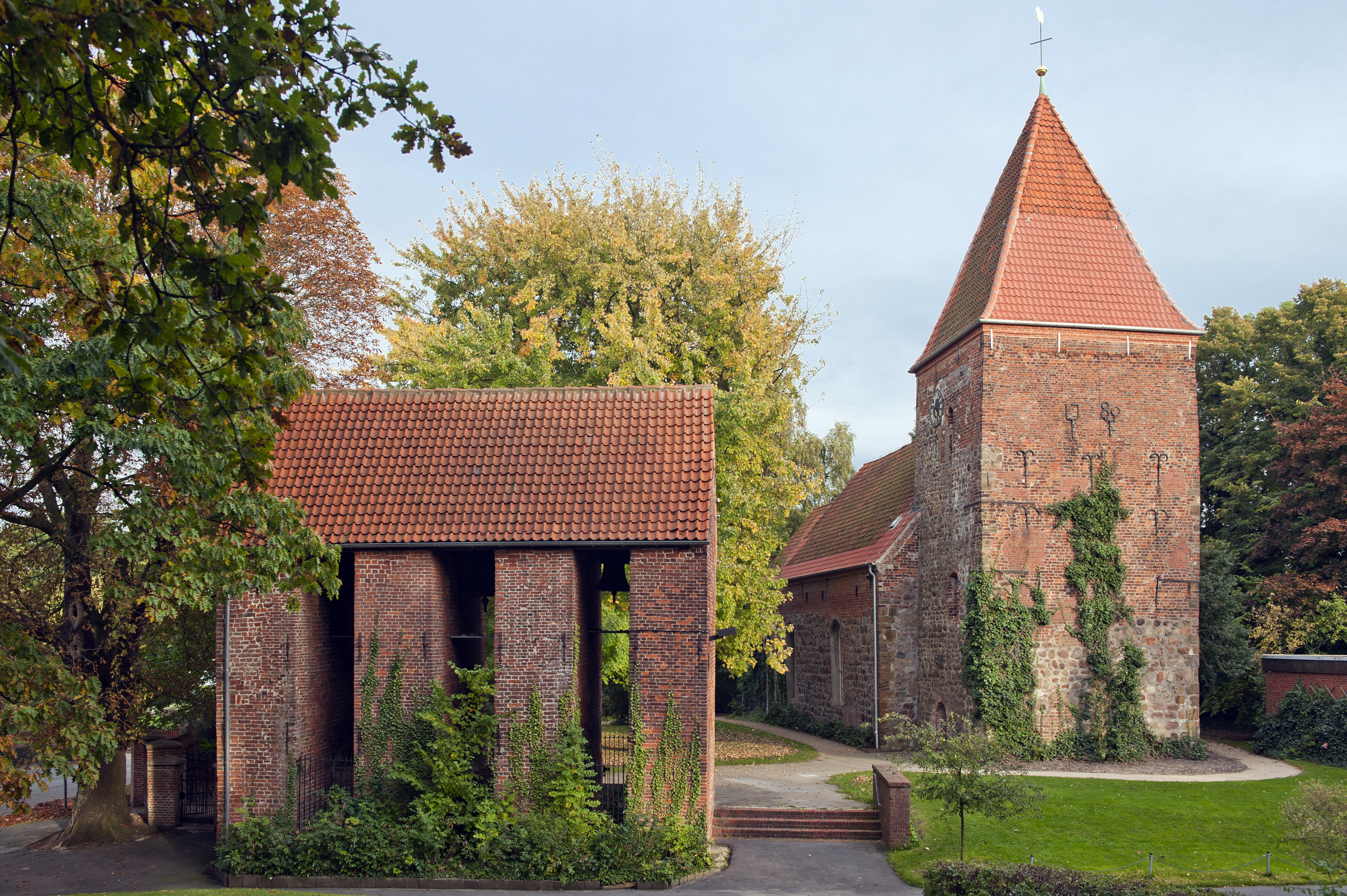 Dionysiuskirche in Wulsdorf/Bremerhaven Das abgebildete Objekt ist ein geschütztes Kulturdenkmal in der Freien Hansestadt Bremen, mit der Nr. 1647 beim Landesamt für Denkmalpflege registriert.